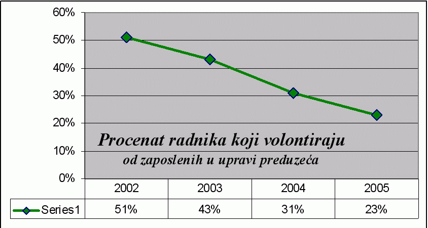 Serbian:Graf-Procenat radnika koji volontiraju(zaposleni u upravi preduzeca)